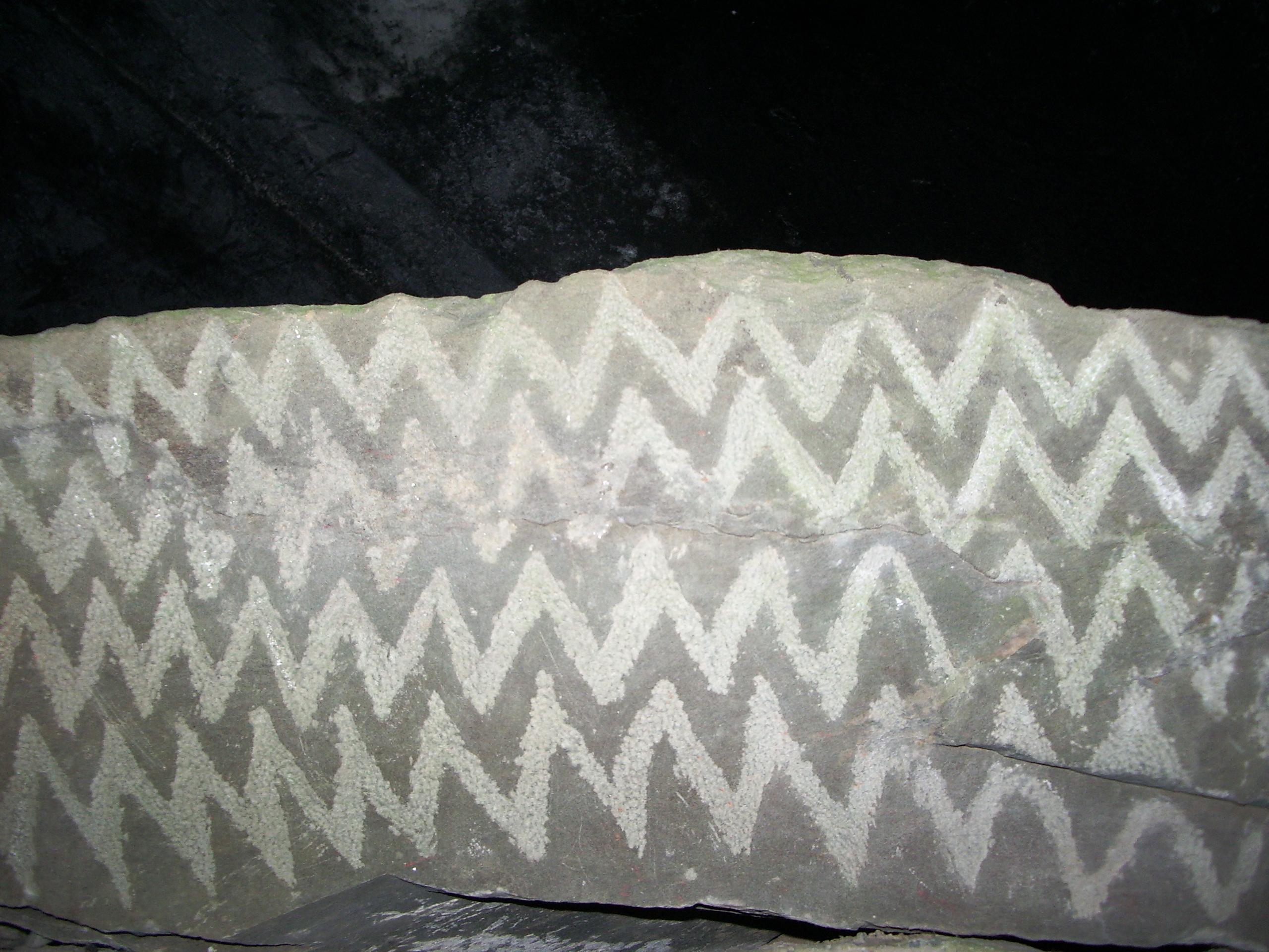 Ritzverzierungen im Passage tomb von Fourknocks.